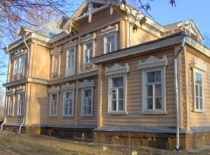 Фотография господского дома в Любимовке